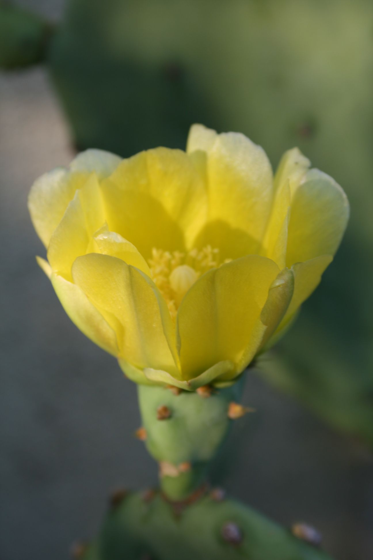 Opuntia stricta var. dillenii (Opuntioideae; Cactaceae; Planta) kaktusz virága